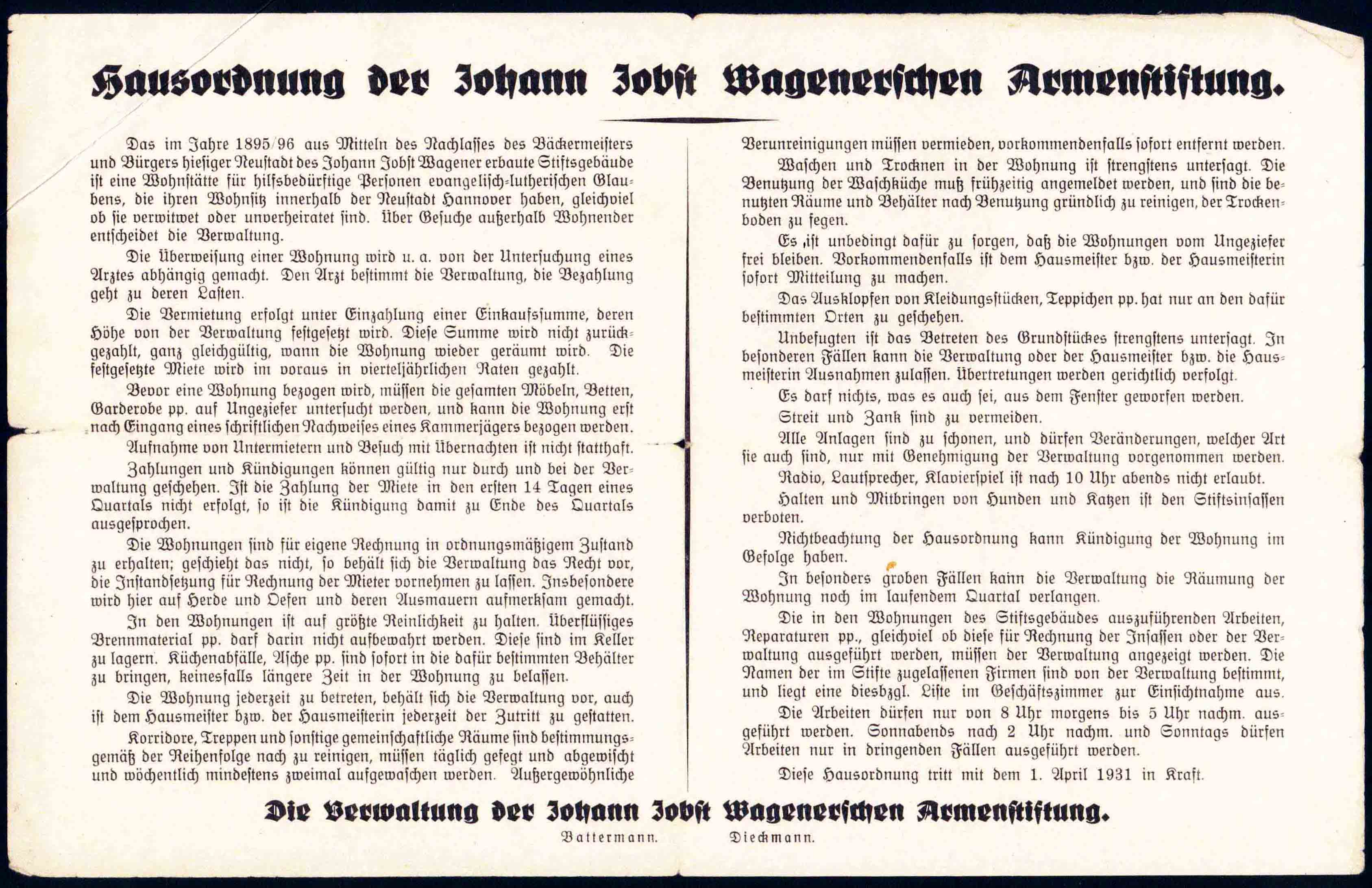 Die zum 1. April 1931 in Kraft getretene „Hausordnung der Johann Jobst Wagenerschen Armenstiftung“ erlassen unter dem Stiftungs-Vorsteher August Battermann junior, gedruckt von der Buchdruckerei Dieckmann in Hannover ...